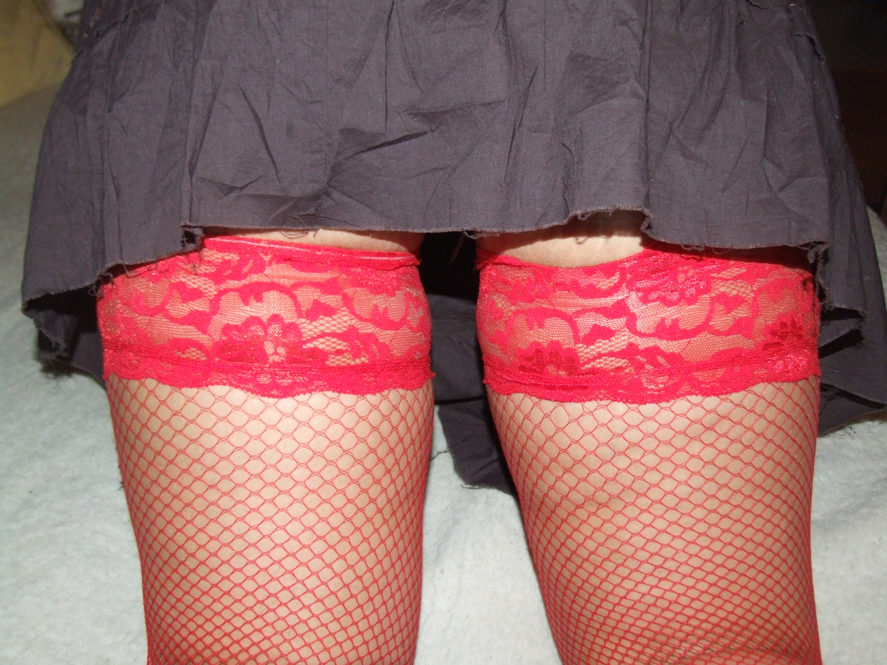 Czerwone pończoszki